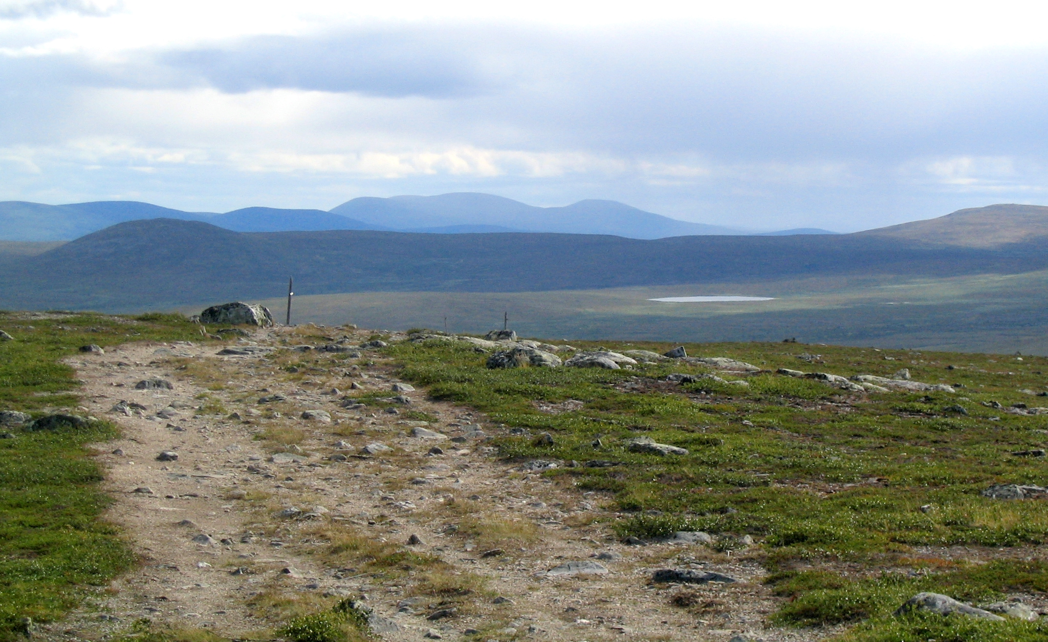 Maisema Hetta–Pallas-vaellusreitiltä Pyhäkero–Sioskuru-välillä.